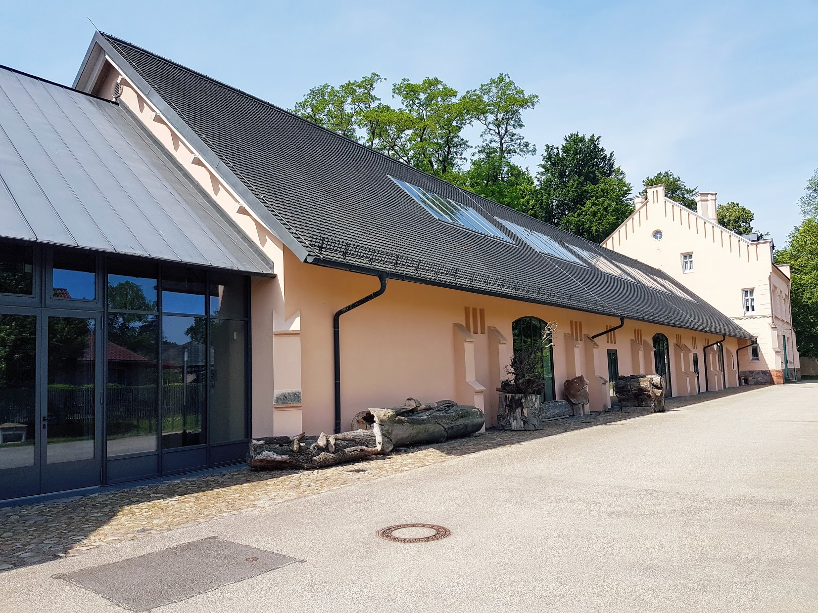 Besucherzentrum auf dem ehem. Gutshof, Branitzer Park (2017)